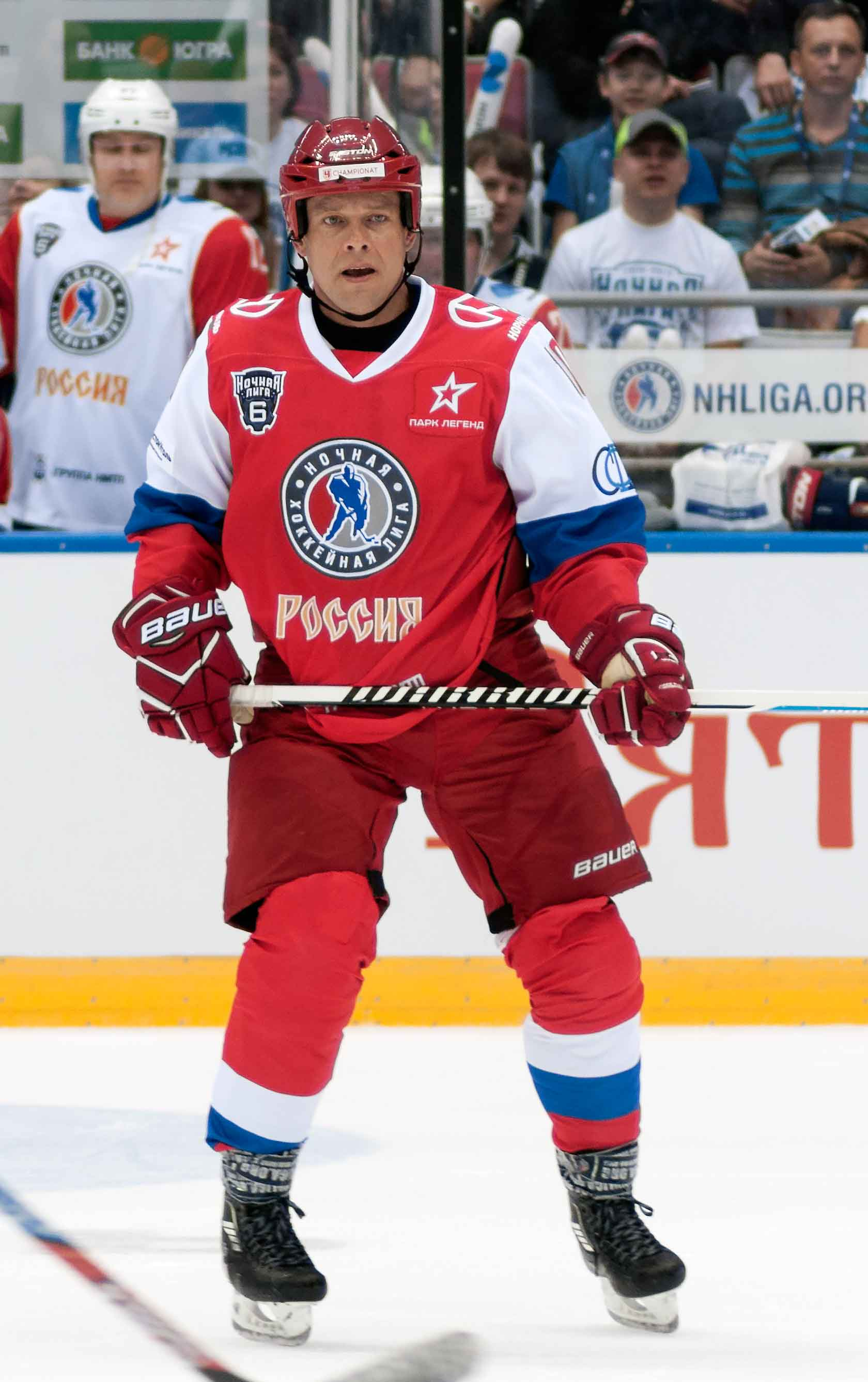 Гала-матч Фестиваля Ночной хоккейной Лиги